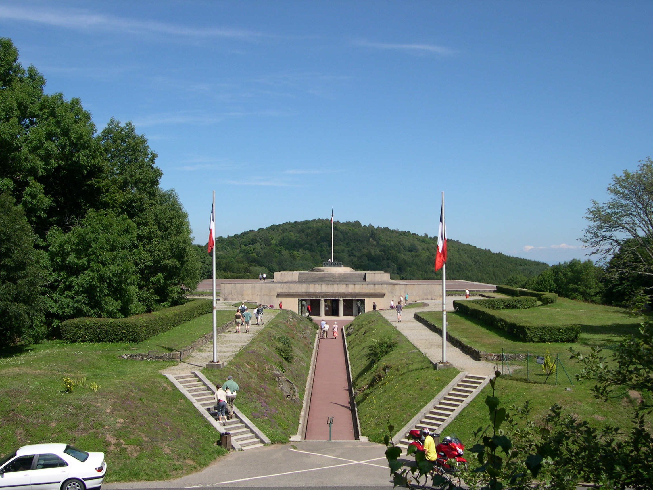 Le Vieil Armand, Massif des Vosges, Haut-Rhin.